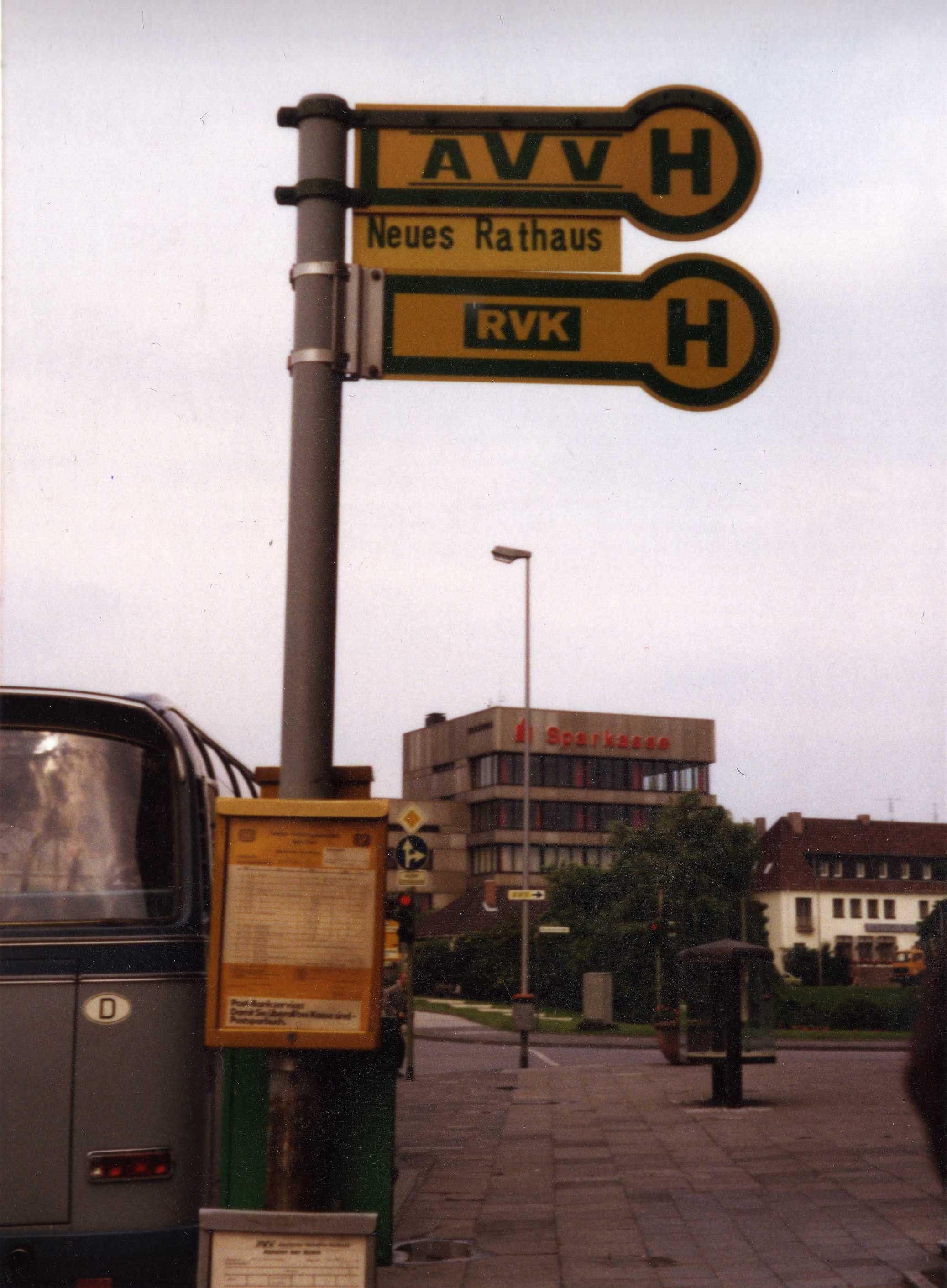 Bus der KFA Jülich (heute Forschungszentrum FZJ) in deren typischer Farbgebung an der zentralen Haltestelle Neues Rathaus in Jülich, Anfang der 1980er Jahre. Jülich war Schnittpunkt der Netze von AVV (Aachener Verkehrsverbund) und RVK (Regionalverkehr Köln), der obere Fahrplan weist zudem auf die Kooperation zwischen Bahnbus und Postbus hin (Omnibus-Verkehrsgemeinschaft Bahn/Post). Der untere Fahrplan trägt lediglich das damalige AVV-Logo, im grünen Kasten auf der Rückseite ist der RVK-Fahrplan ausgehängt. Die Fahrpläne der KFA-Busse wurden nur intern an die KFA-Mitarbeiter bekanntgegeben. Das Foto zeigt einen Mercedes-Benz O 302, Baujahr um 1970.